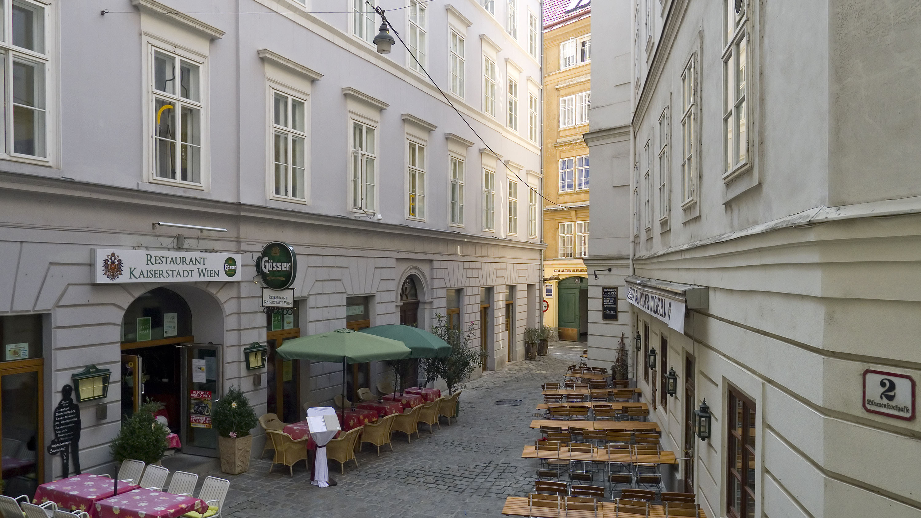 Blumenstockgasse in Wien 1 bei Nr. 3 Richtung Südosten